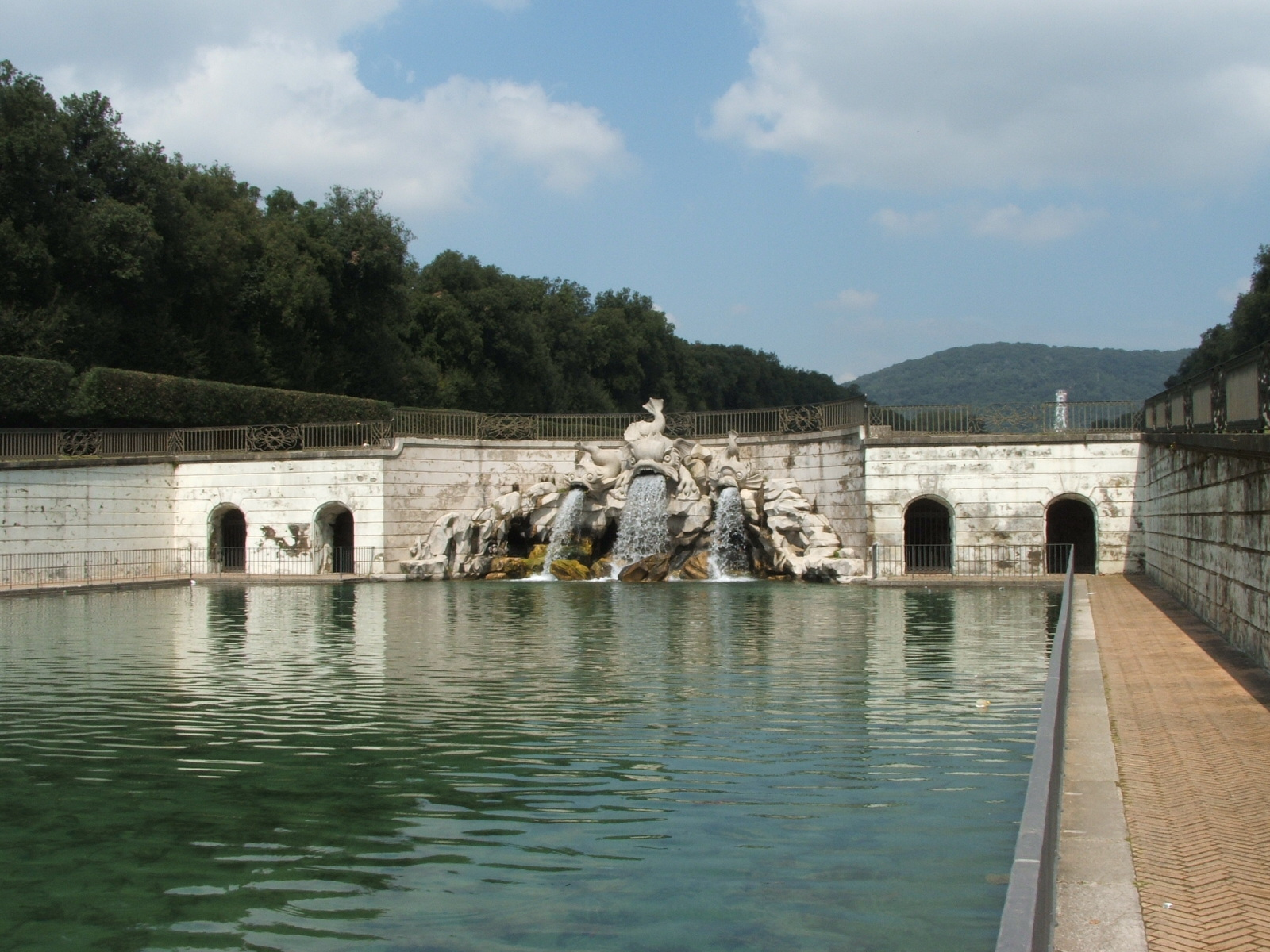 Reggia di Caserta, Caserta, Campania, Italia. Statue e fontane nel parco. Fontana dei tre delfini, dalle cui gole spalancate sgorga l'acqua. Il più grande è quello centrale ed ha braccia ed artigli terrestri (vedi immagini alternative). Lo scultore autore dell'opera marmorea è Gaetano Salomone.